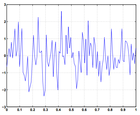 Plot função aleatória